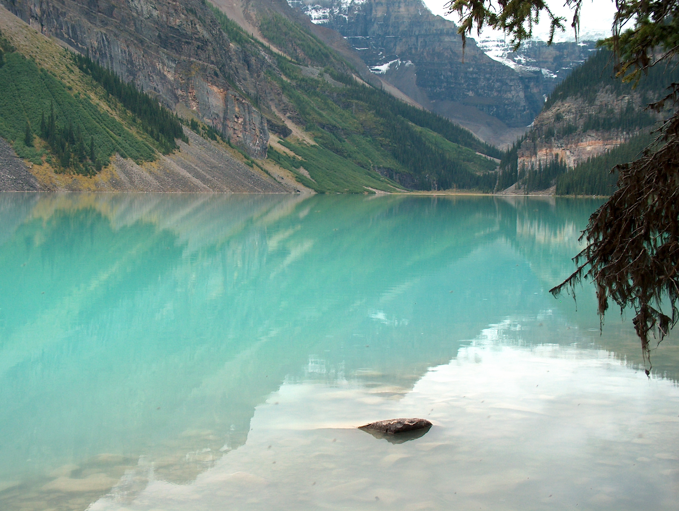 Der Lake Louise im Banff-National-Park,Alberta,Canada.